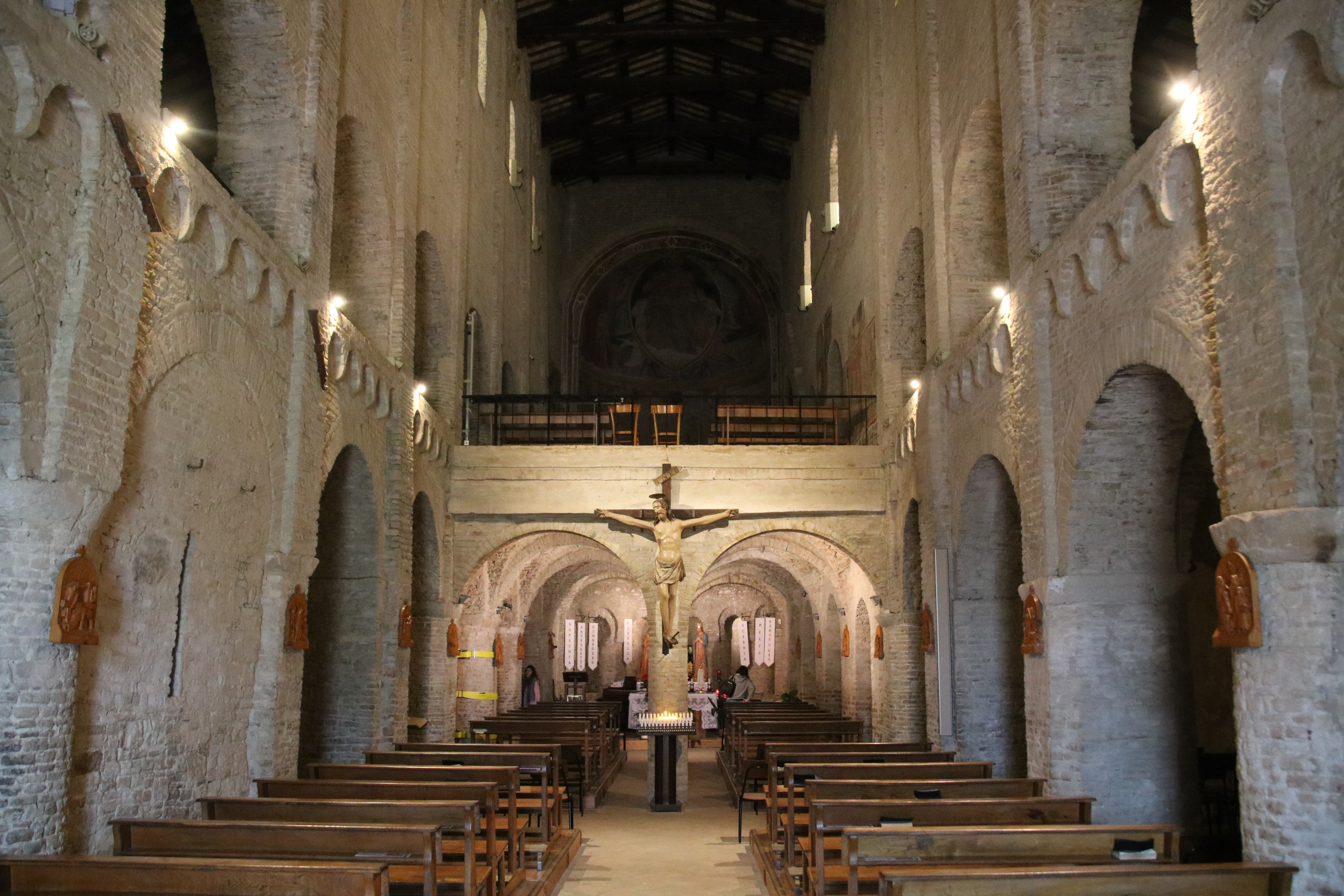 Basilica della Santissima Annunziata (Montecosaro)